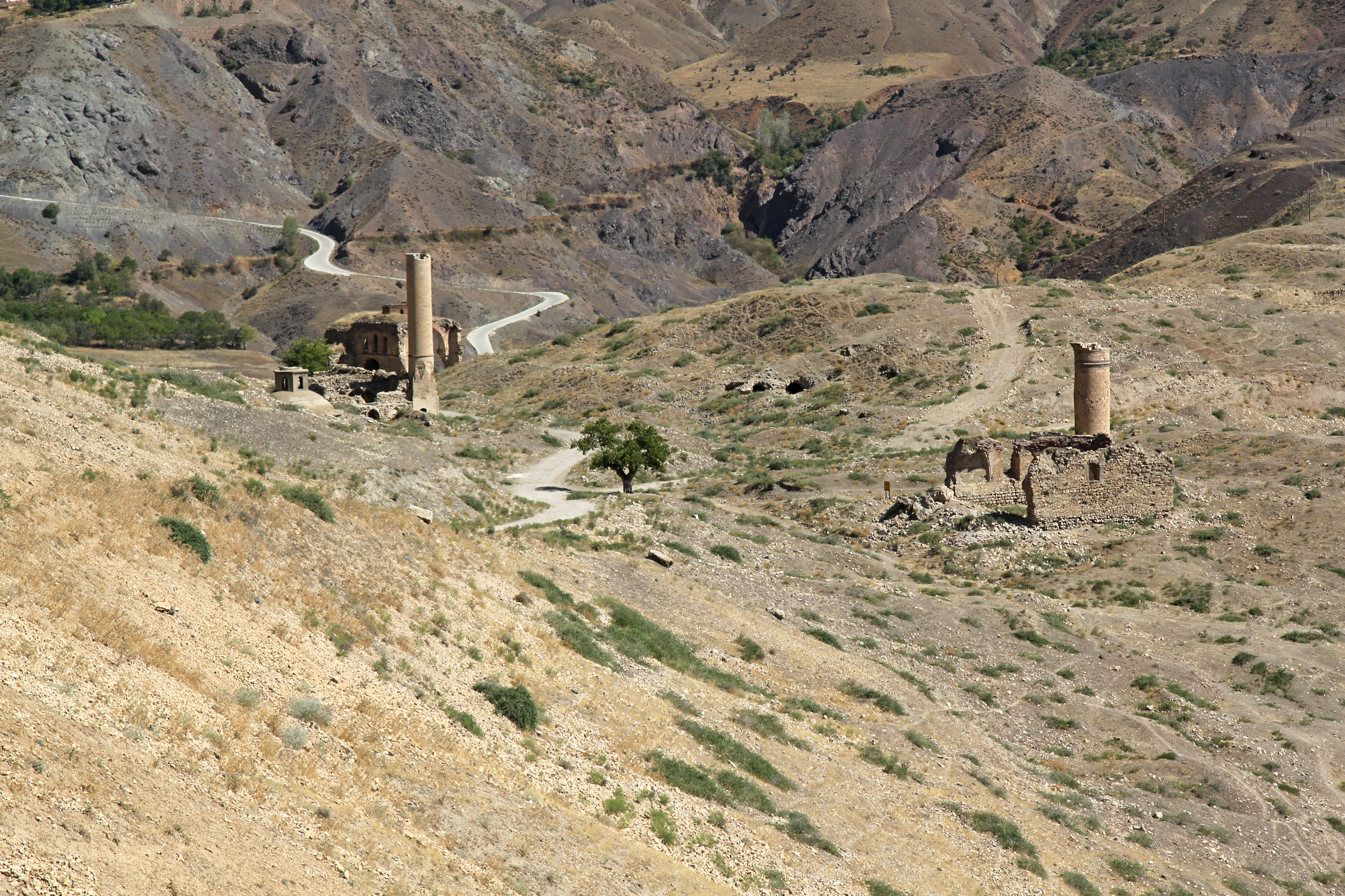 Palu, Provinz Elazığ, Türkei, Blick vom Burgberg auf die Große und Kleine Moschee, links das Hamam, im Hintergrund die Kirchenruine